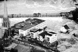 Inondations à Chicoutimi lors du Déluge du Saguenay, 19 au 21 juillet 1996. Tous les bâtiments à droite de l'église ont été emportés par l'eau sauf la petite maison blanche.